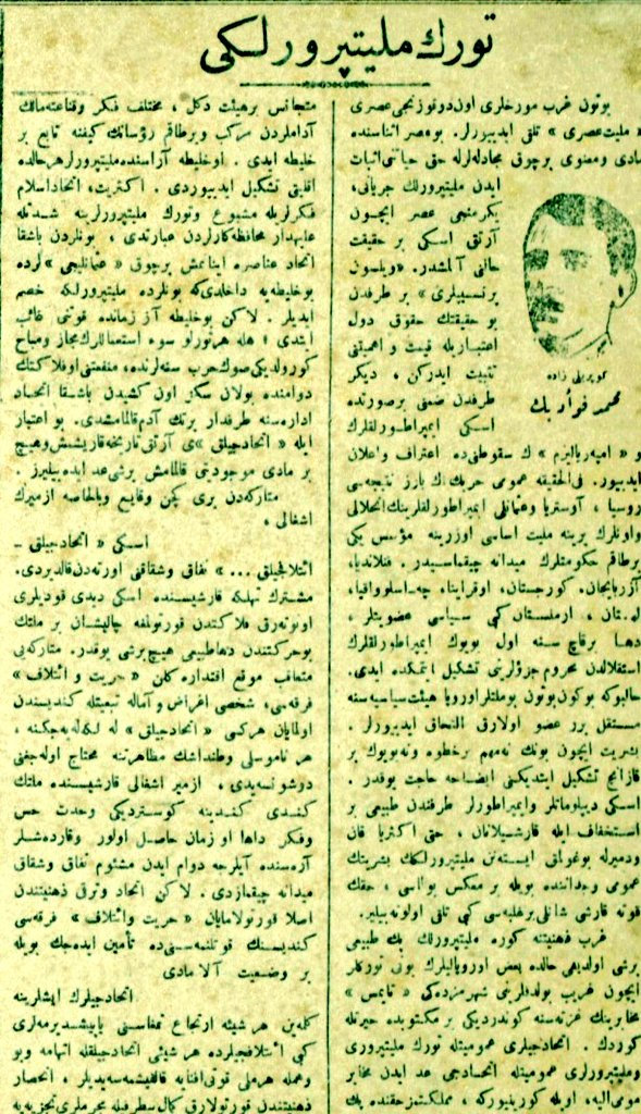 Mehmet Fuat (Köprülü) Bey'in 21 Ağuston 1919 tarihli yazısı